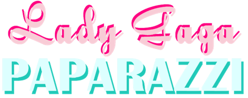 Logo de "Paparazzi", creado por User:El Javo y subido por mí